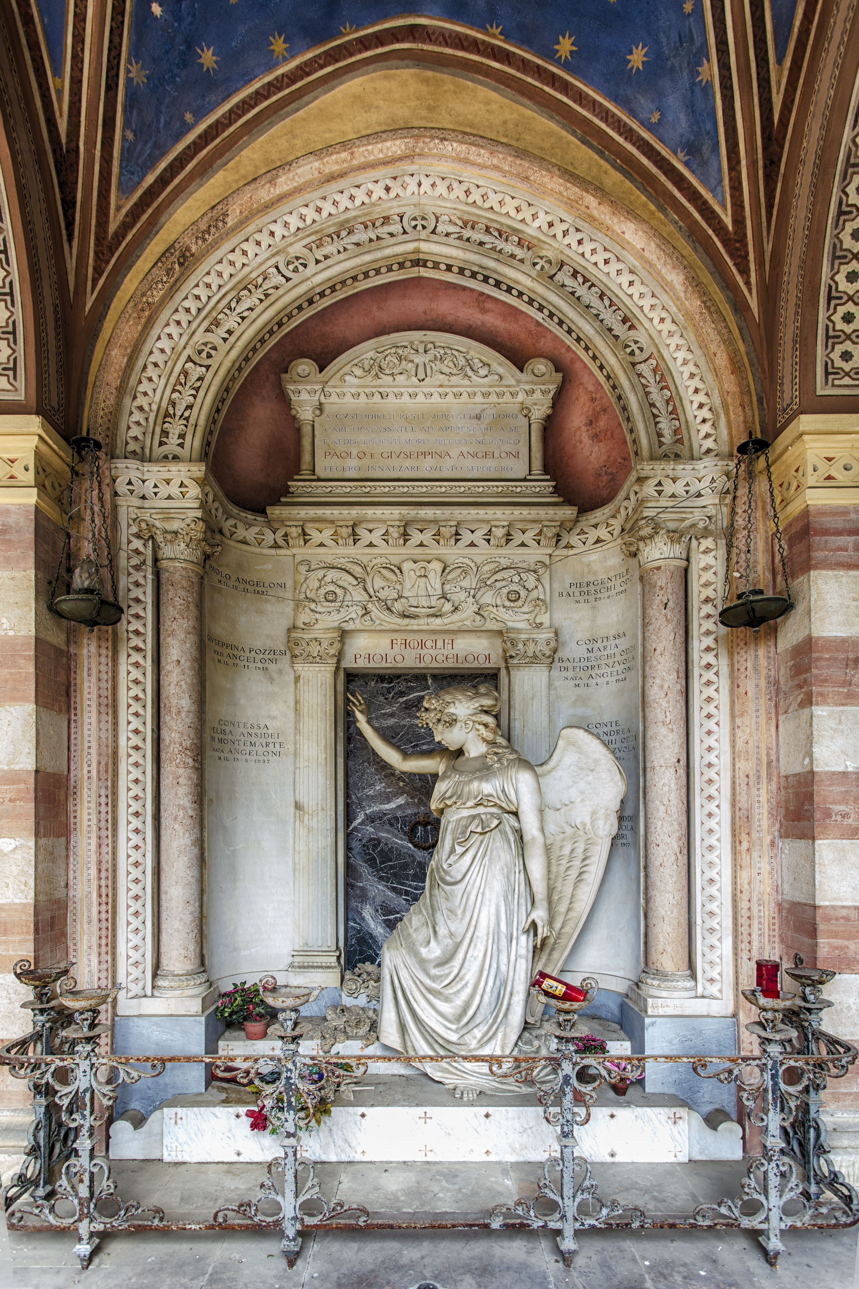 Cimitero Monumentale, proprietà famiglia Angeloni, scultore:Raffaele Angeletti e Francesco Biscarini This is a photo of a monument which is part of cultural heritage of Italy.